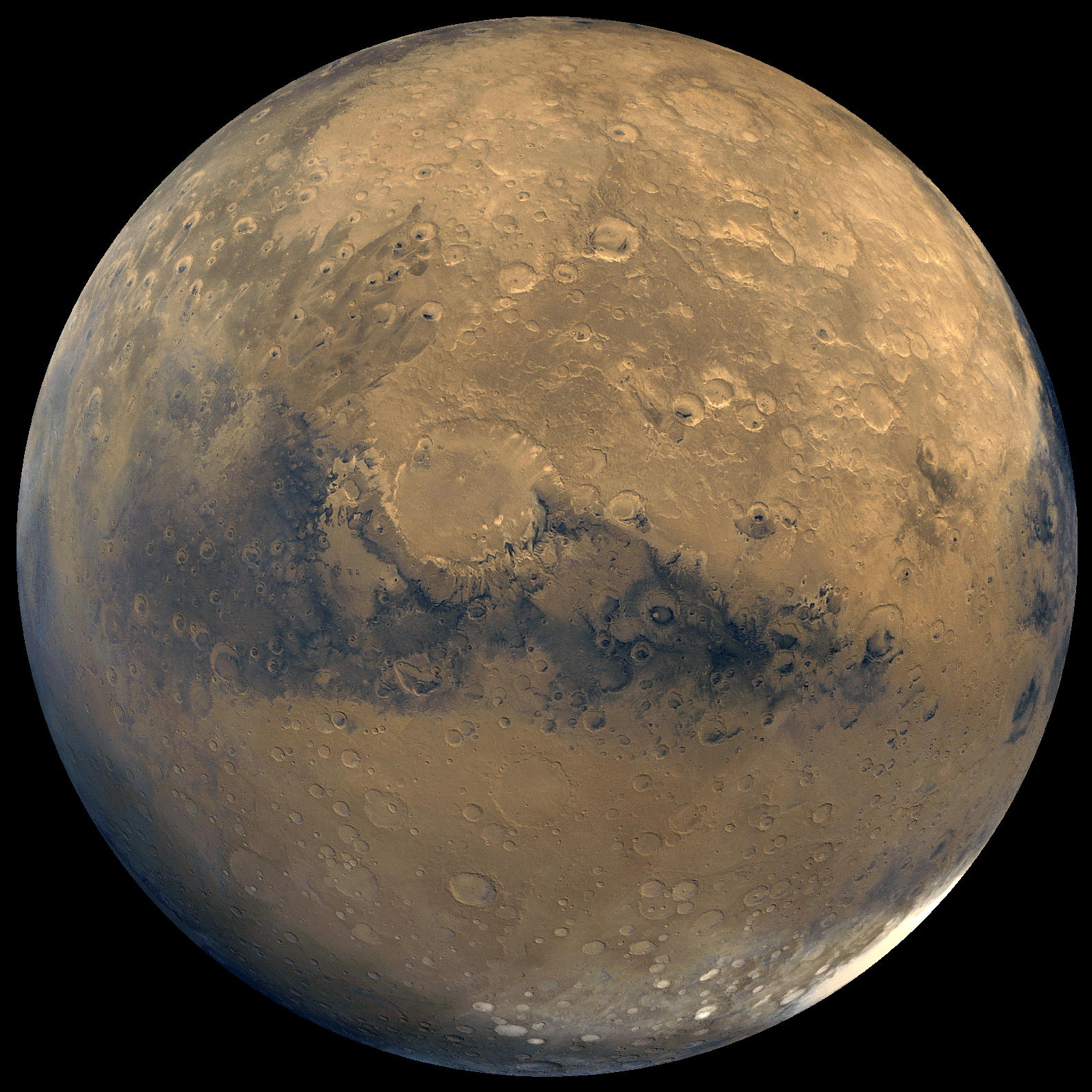 Снимок так называемого полушария Скиапарелли Марса, получен на основе 100 снимков с красным и фиолетовым фильтром, сделанных «Викингом-1» и «Викингом-2» в 1980 году. Центр — точка с координатами -5 градусов широты, -20 градусов долготы. Чуть левее центра снимка виден большой кратер Скиапарелли, в правом верхнем углу — кратер Тихонравов.